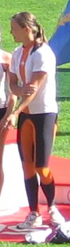 Niina Kelo Kalevan kisoissa, Ratinan stadionilla, Tampereella, 26. heinäkuuta 2008